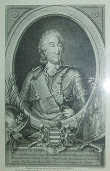 Jean Paul Timoléon de Cossé-Brissac, Maréchal de France (1698-1784)